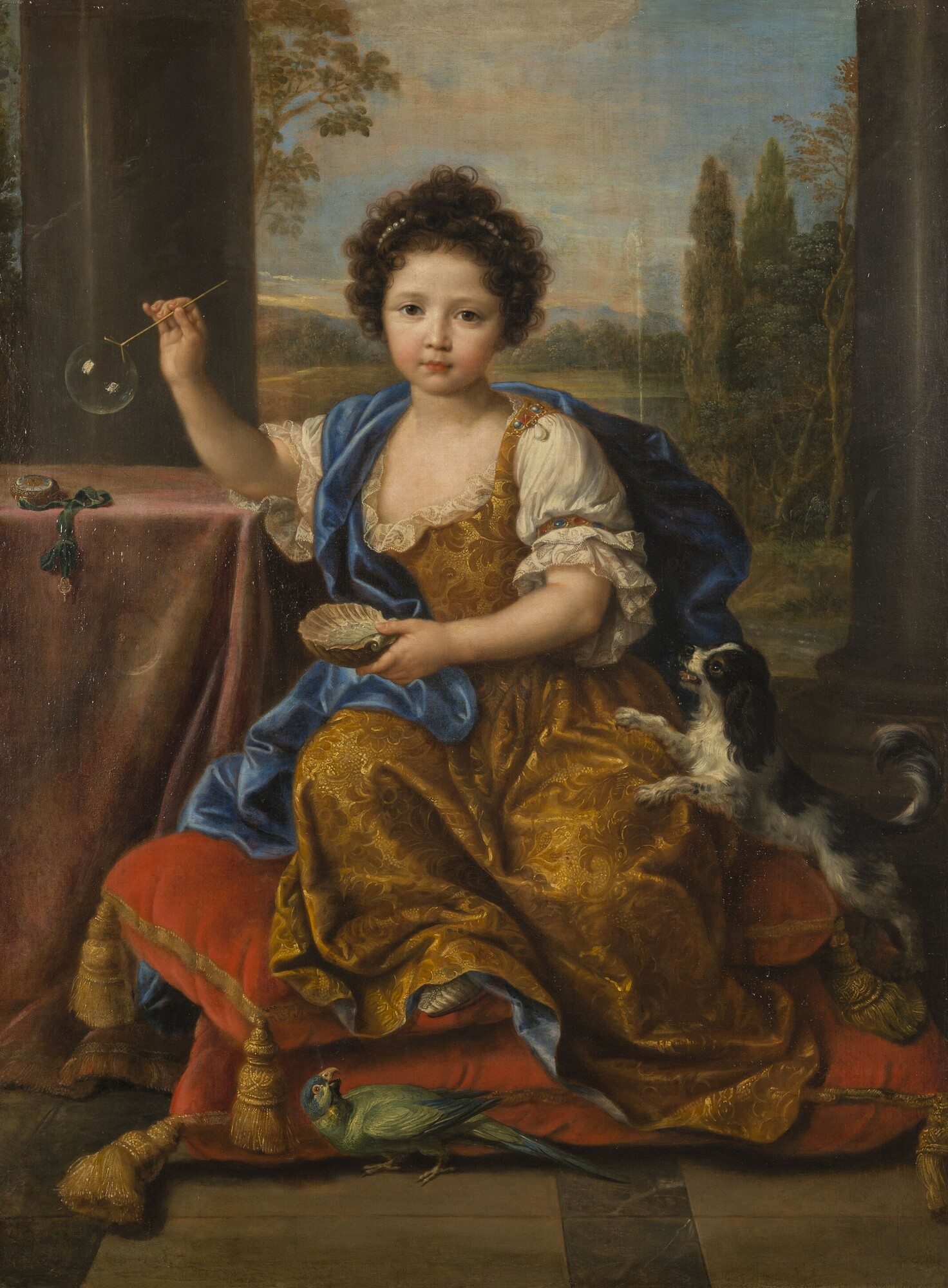 fille légitimée de Louis XIV et de la marquise de Montespan ; portrait posthume, dit La fillette aux bulles de savon